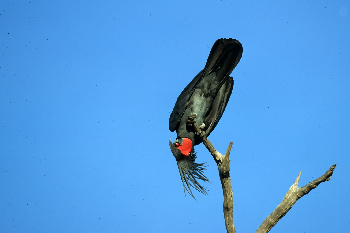 Imponierverhalten eines Palmkakadus auf der Kap-York-Halbinsel